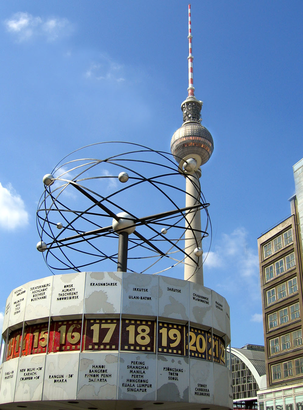 Die Weltzeituhr am Alexanderplatz in Berlin mit dem Fernsehturm im Hintergrund.